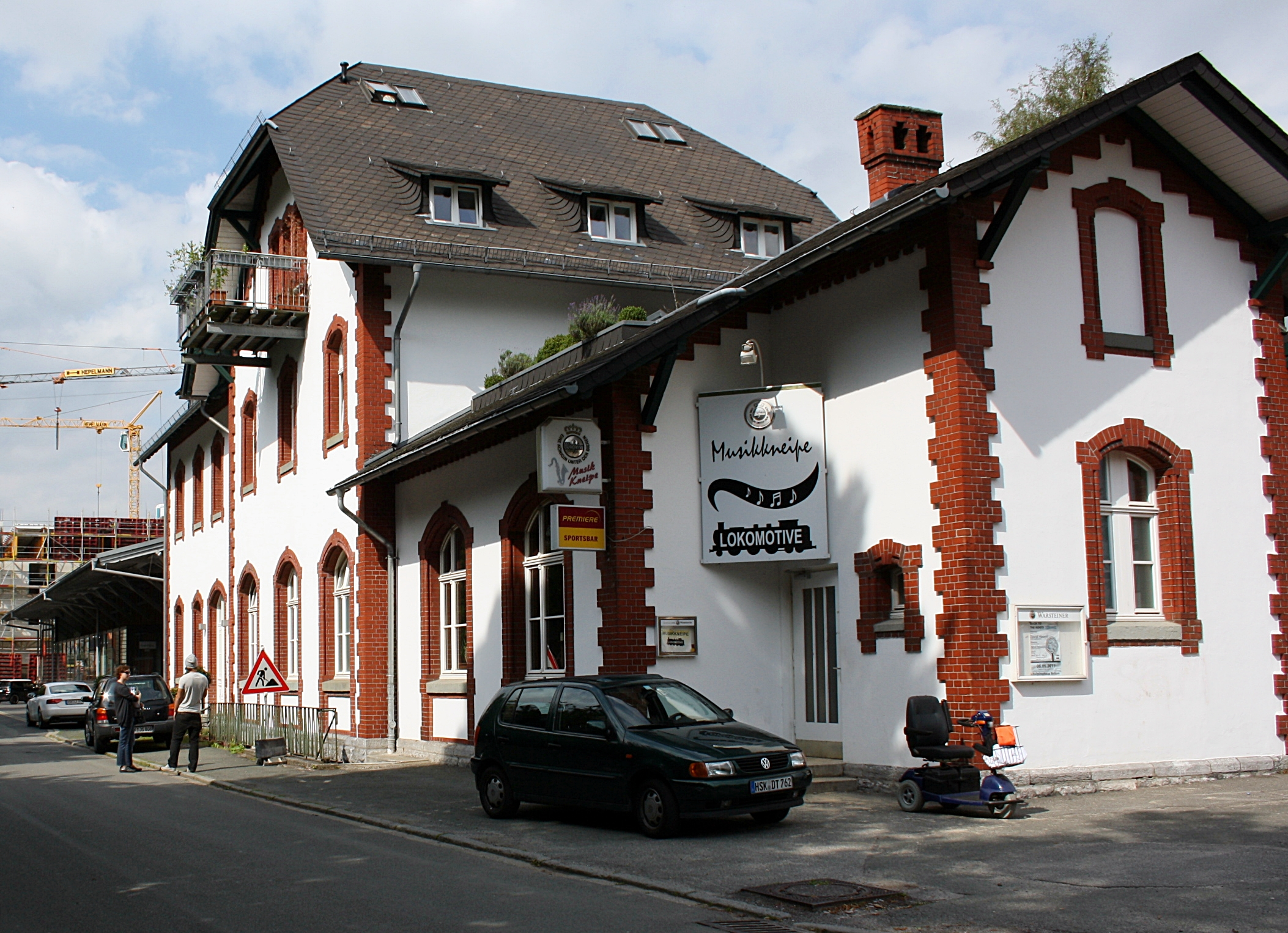 Brilon, Bahnhofstraße 39 This image shows a heritage building in Germany, located in the North Rhine-Westphalian city Brilon.